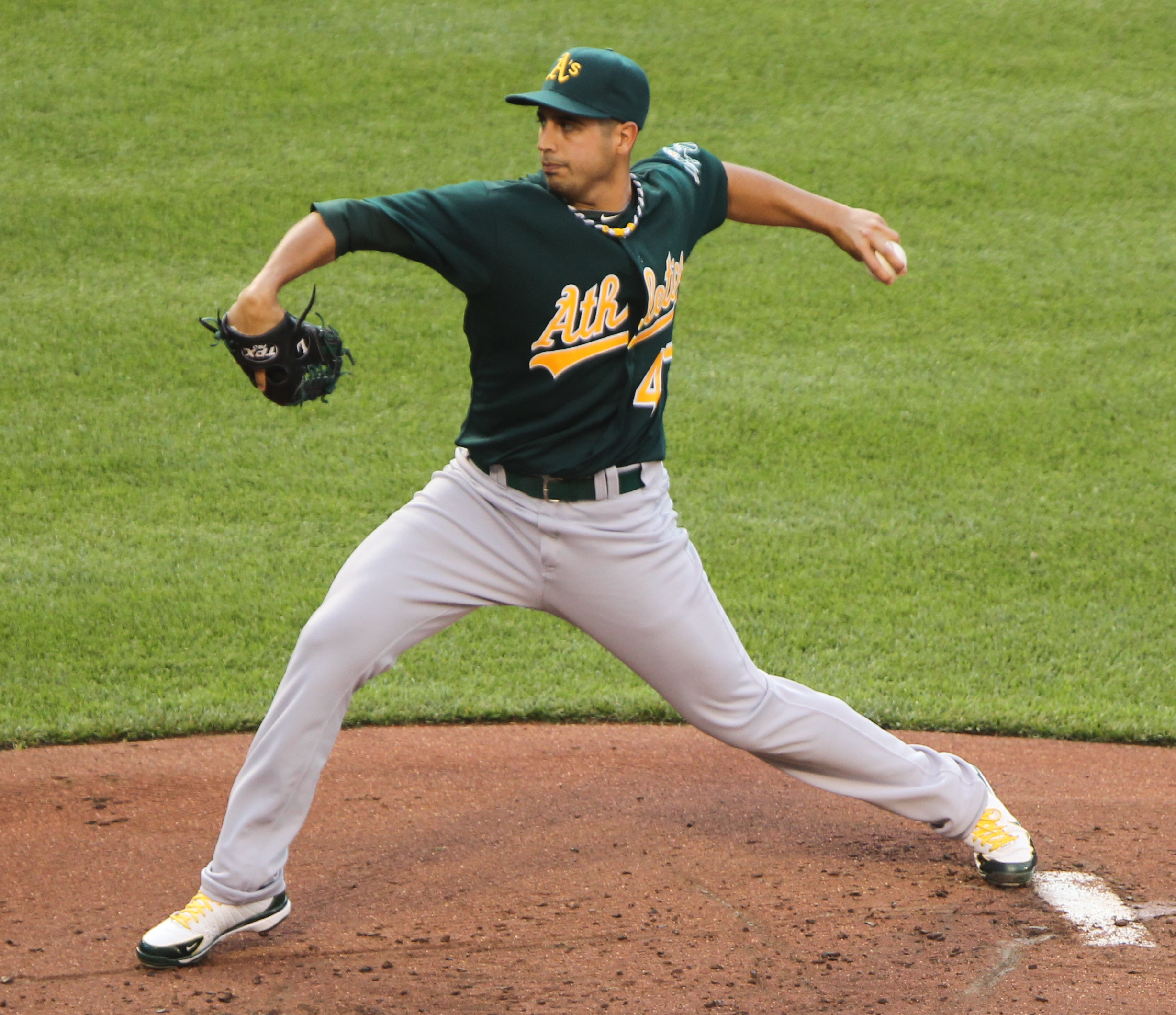 Gio Gonzalez